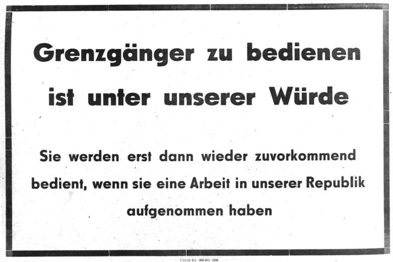 ADN-ZB-4.8.1961 Plakat zum Problem der in Westberlin arbeitenden DDR-Bürger. Dieses Plakat wurde in Geschäften des Kreises Königs-Wusterhausen, einem Randgebiet von Berlin, angebracht. Information added by Wikimedia users. placard textdeenGrenzgänger zu bedienenist unter unserer WürdeSie werden erst dann wieder zuvorkommendbedient, wenn sie eine Arbeit in unserer Republikaufgenommen habenTo serve cross-border commutersis beneath our dignityYou will not be served courteouslybefore you have taken a job in our republic